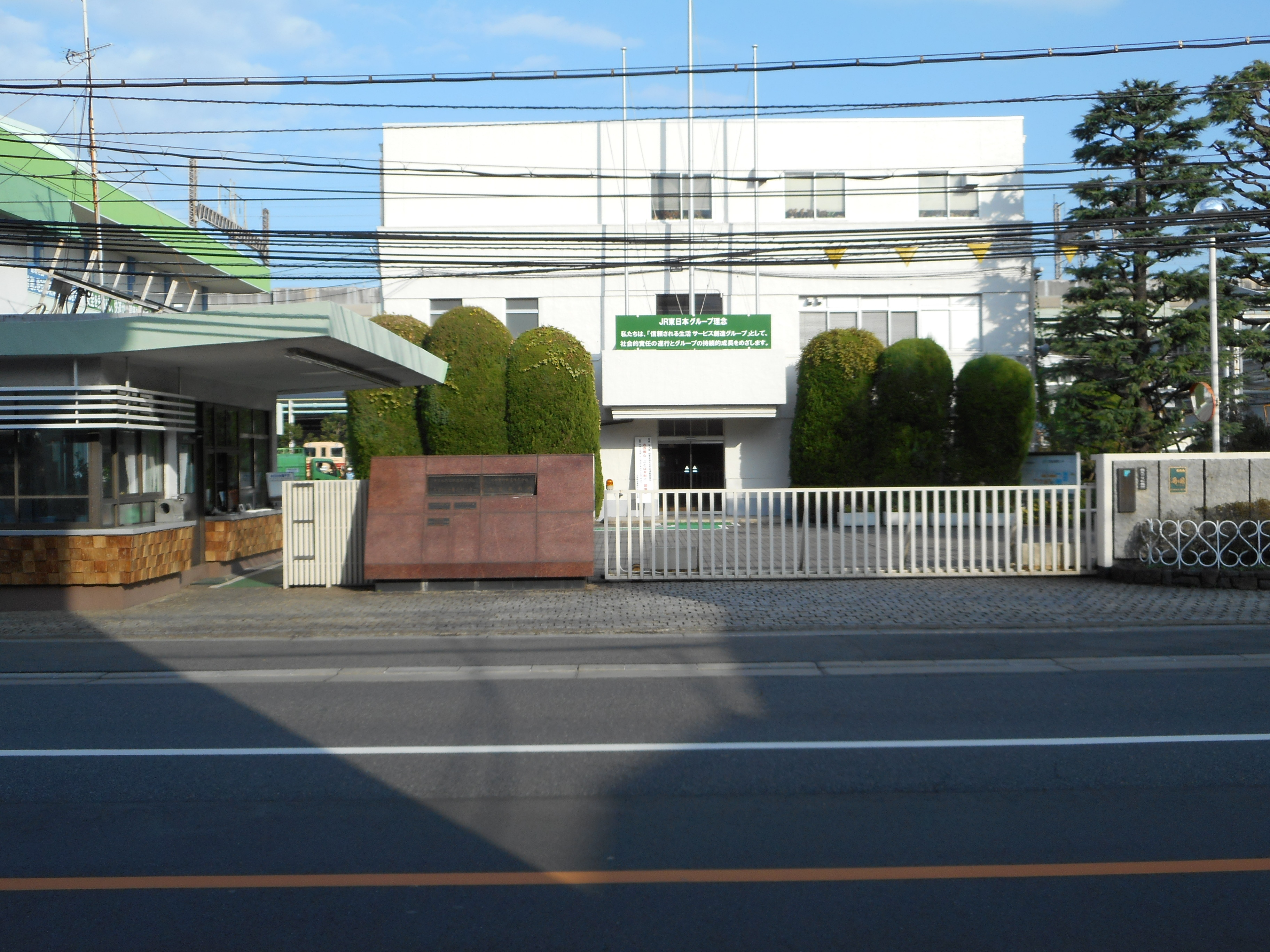 大宮総合車両センター正門（敷地外より撮影）